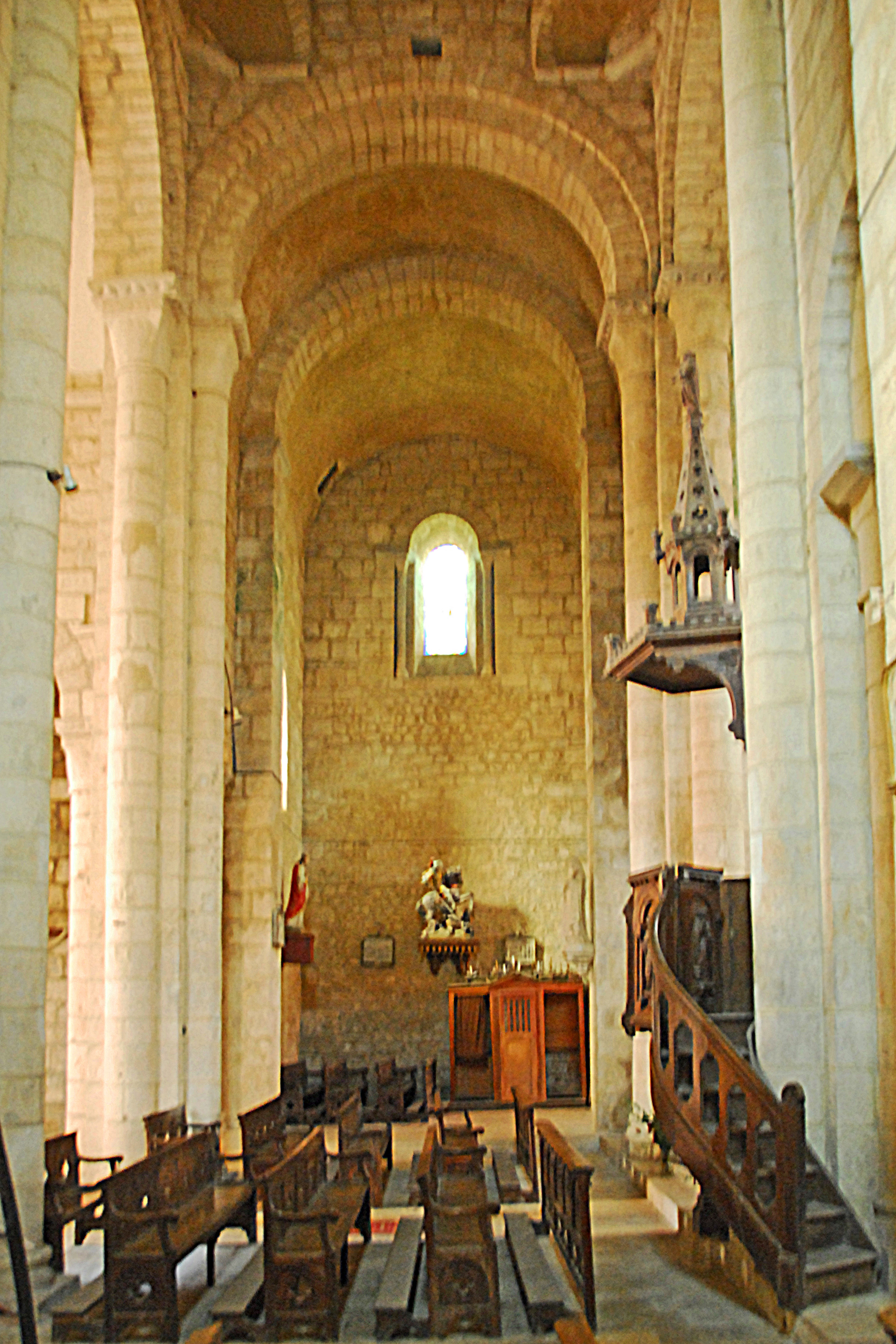 Ste-Croix de Veauce, Vierung u. nördl. Querhausarm